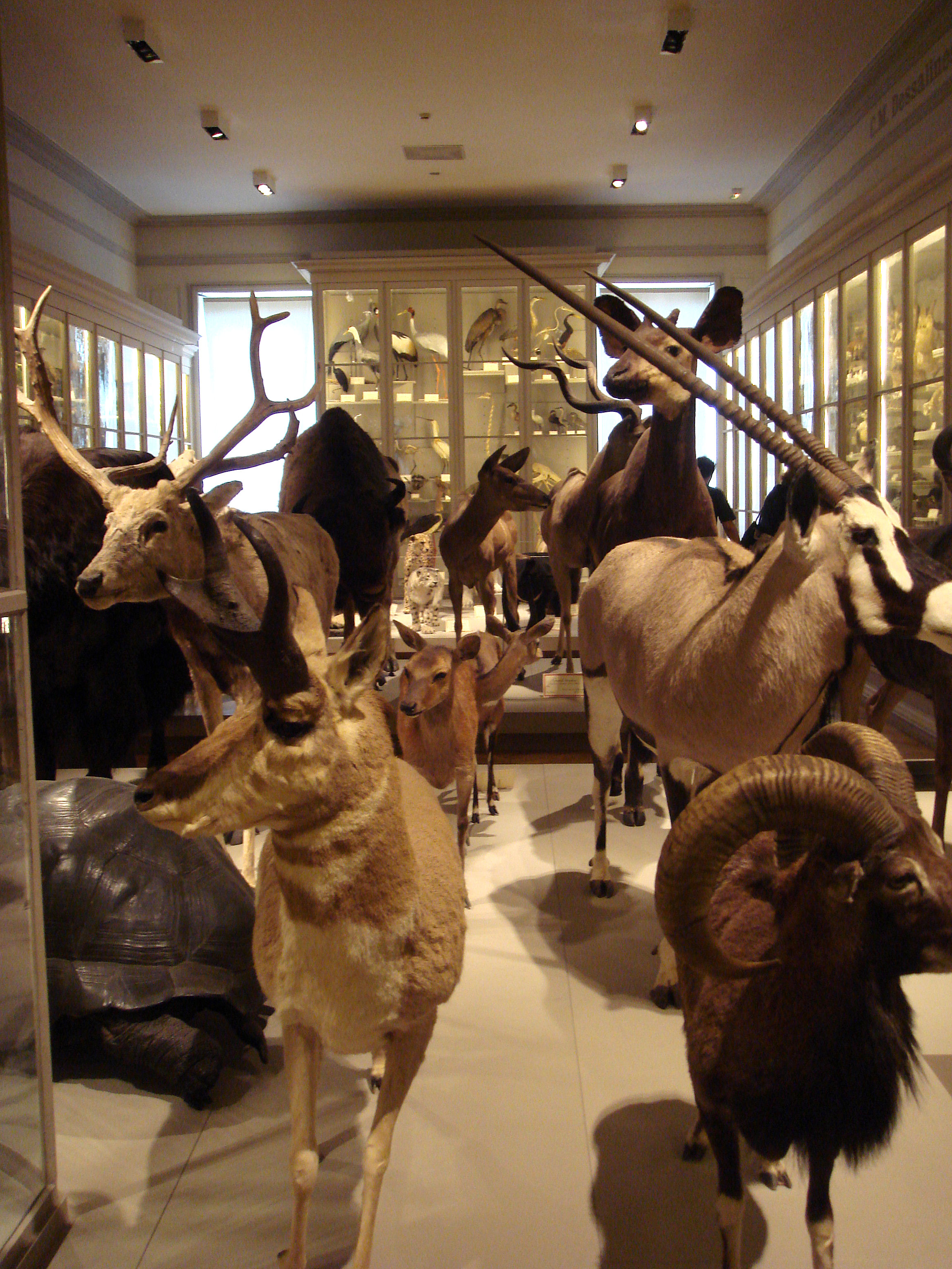 Musee_Histoire_Naturelle_La_Rochelle.